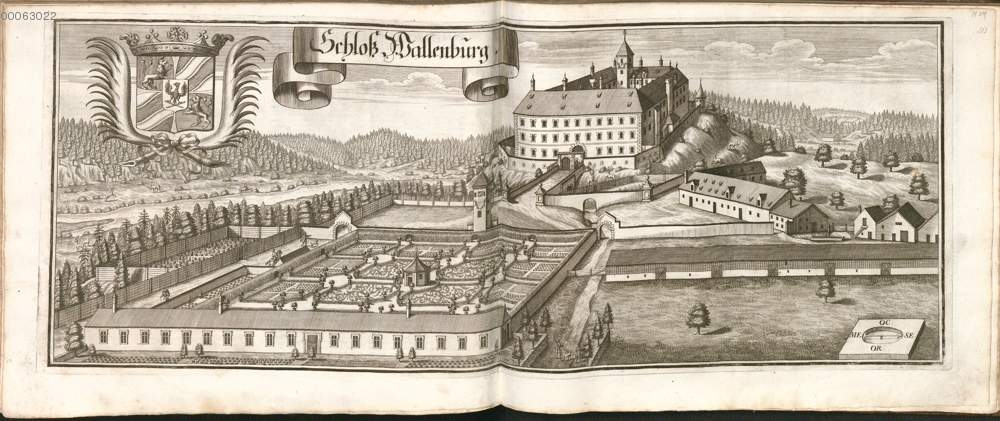 Kupferstich von Schloss Wallenburg